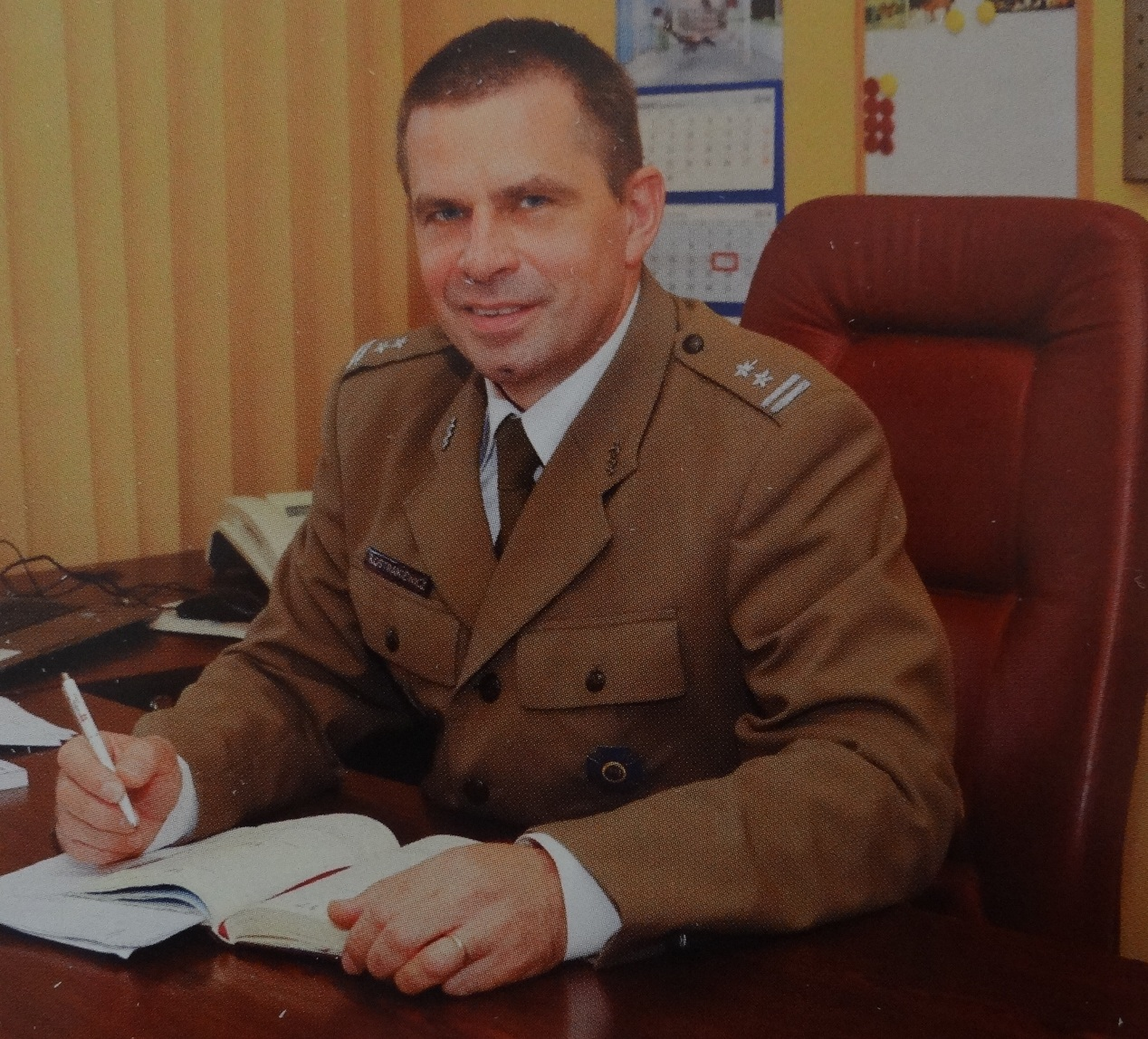 Szczecin, 2014 r. Zastępca komendanta Obwodu Profilaktyczno-Leczniczego ppłk mgr inż. Zbigniew Kostrakiewicz